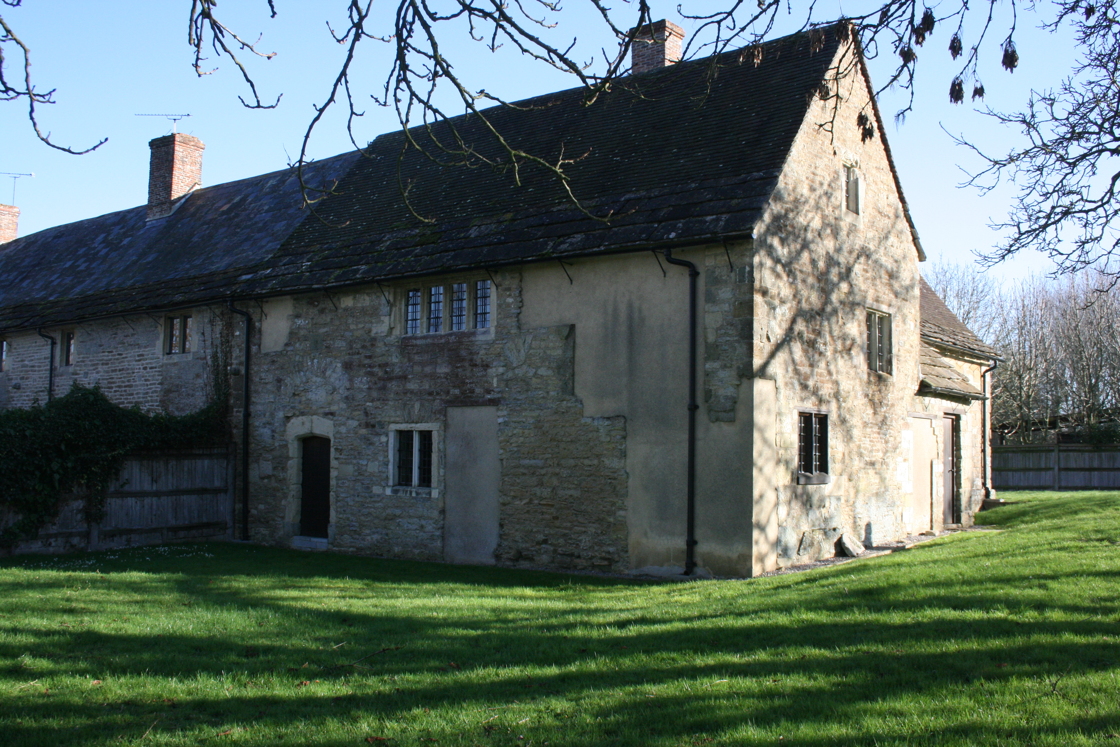 Fiddleford Manor, Dorset, England